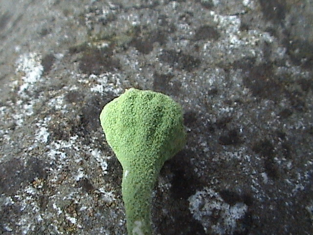 Cladonia fimbrata